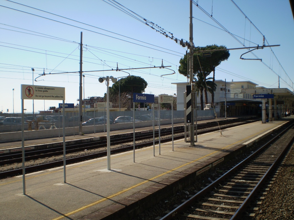 La stazione di Formia-Gaeta